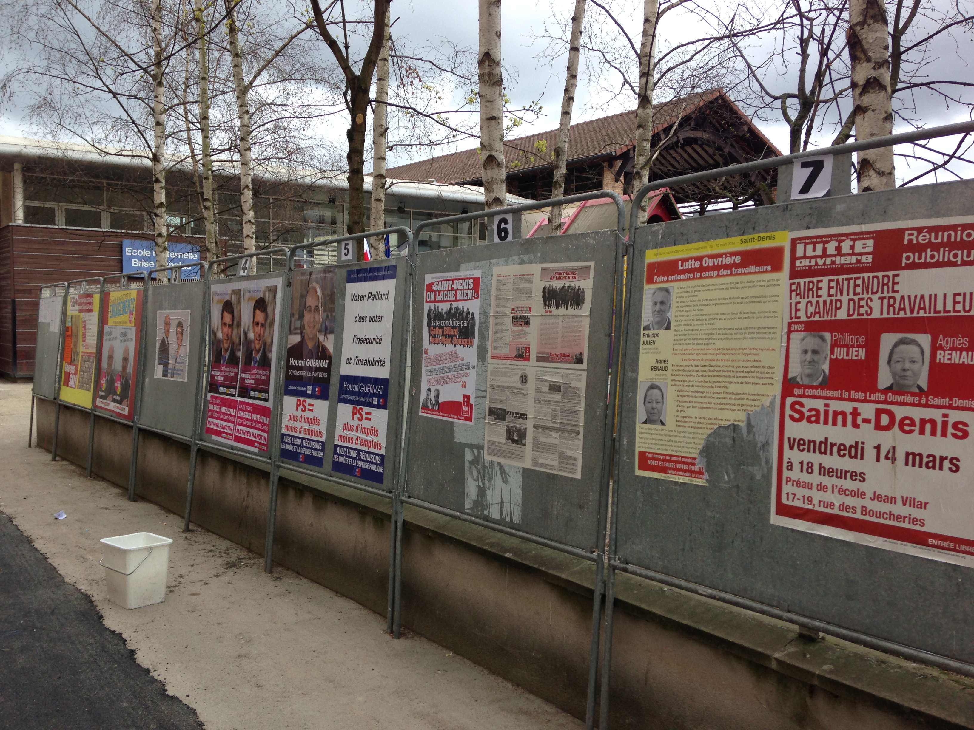 Série complète des 7 panneaux électoraux du premier tour pour les élections municipales de Saint-Denis (Seine-Saint-Denis) devant le bureau de vote de l'école Brise-Echalas.